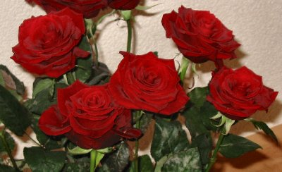 Rozen, foto zelf gemaakt en ter beschikking gesteld voor vrij gebruik door, Gebruiker:Ellywa